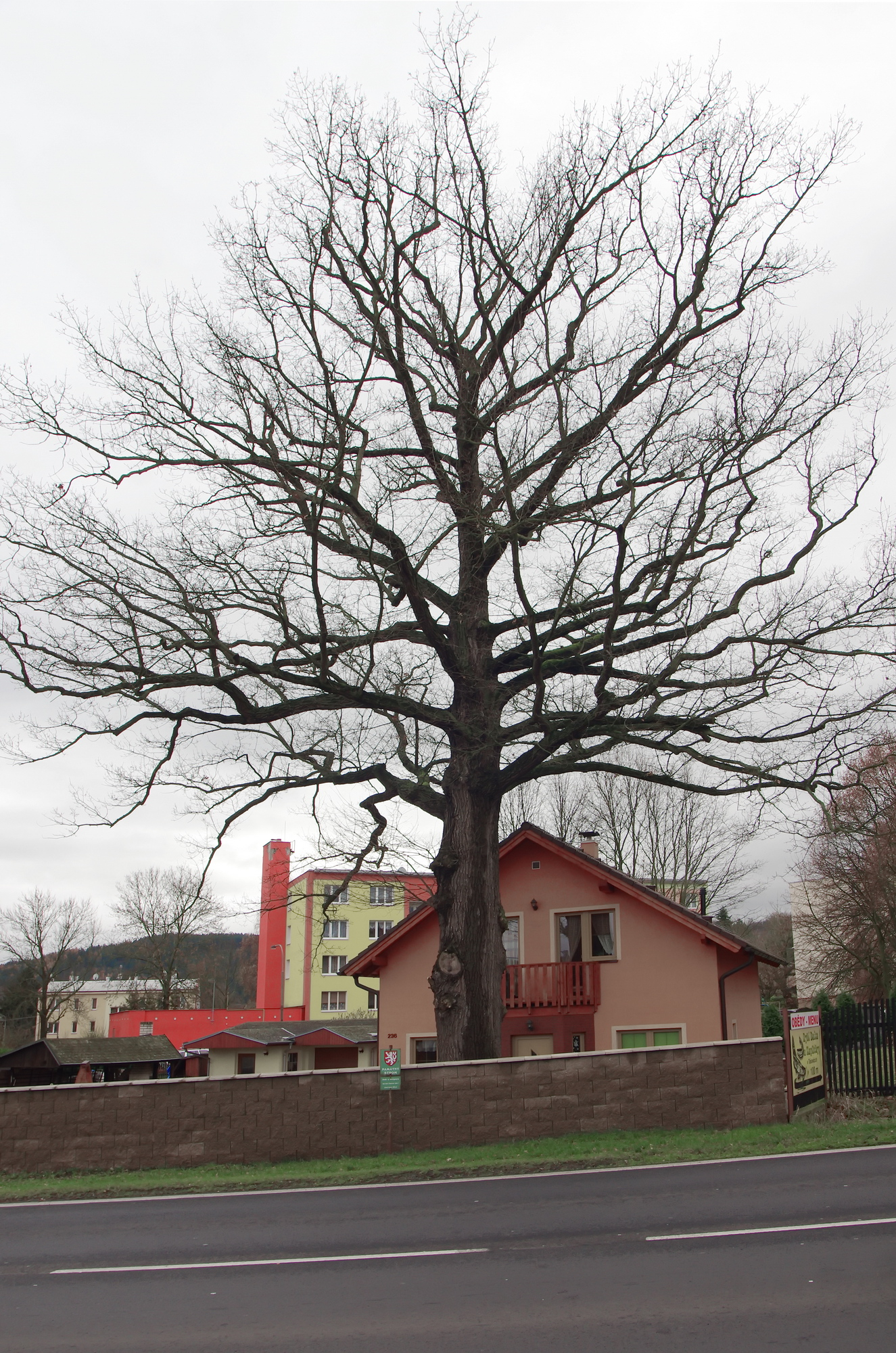 památný strom - Dub u Nešporů - Tašovice (místní část Karlových Varů), okres Karlovy Vary